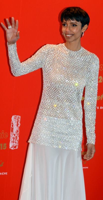 Sonia Rolland à la cérémonie des César